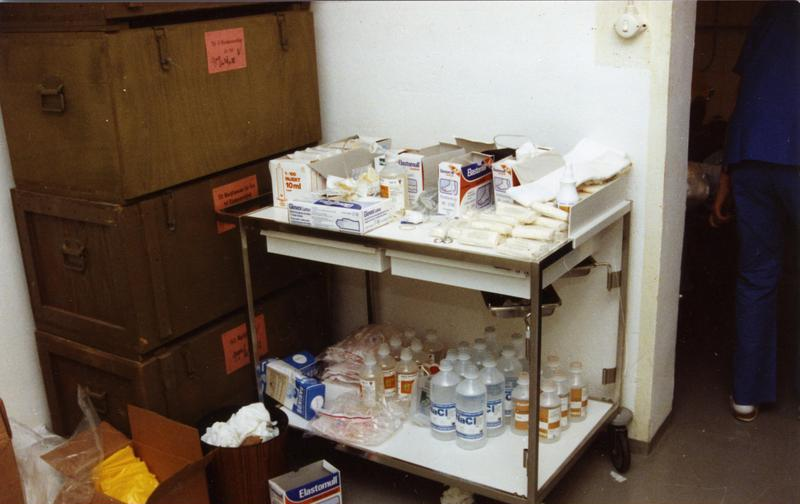 Zivilschutz, Hilfskrankenhausübung Hilfskrankenhausübung HKH Neuhaus, Labor 28.10.1989, Neuhaus/Schliersee